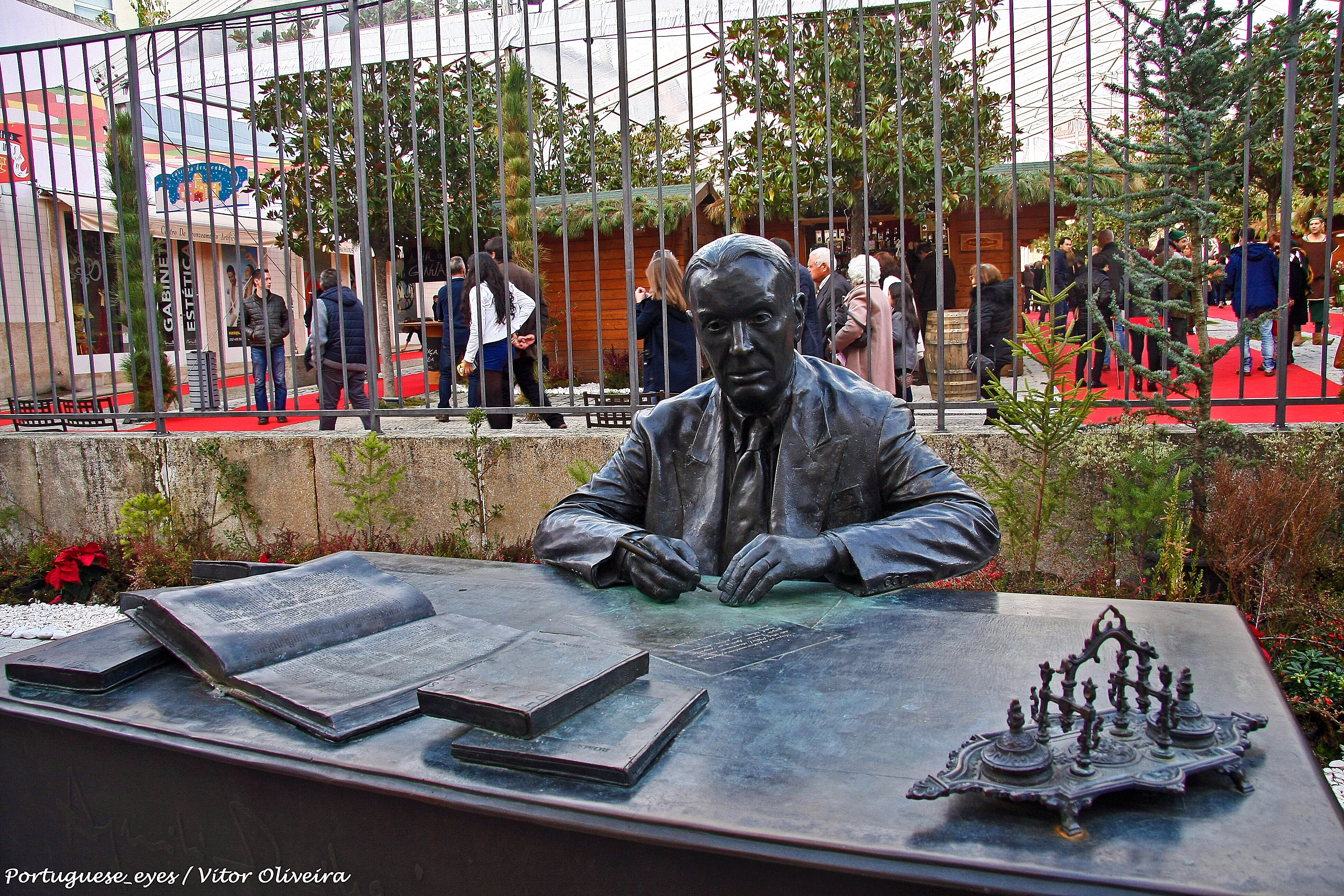 Monumento a Aquilino Ribeiro - Viseu - Portugal